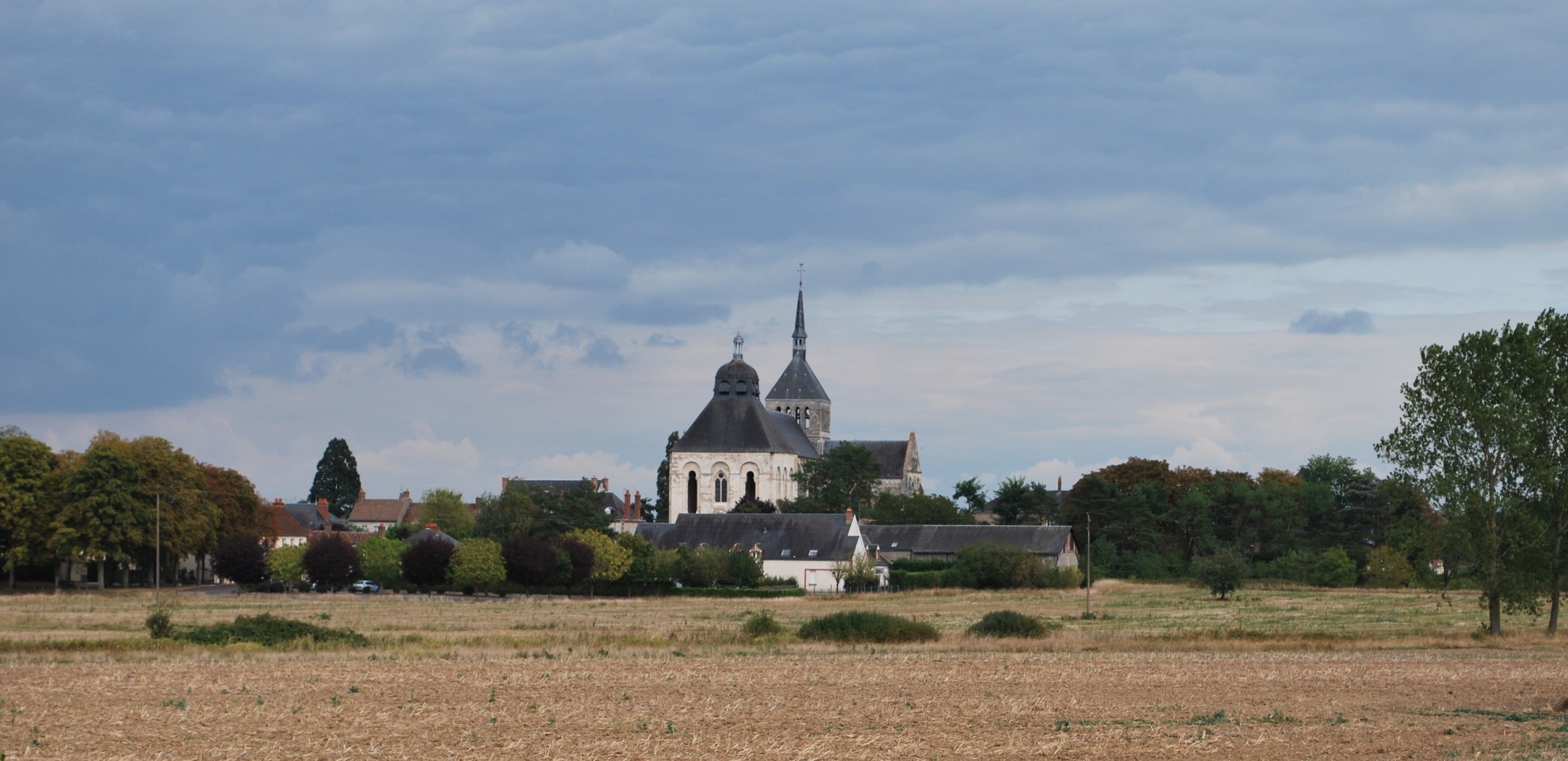 Abtei Saint-Benoît-sur-Loire gesehen aus Richtung der Loire